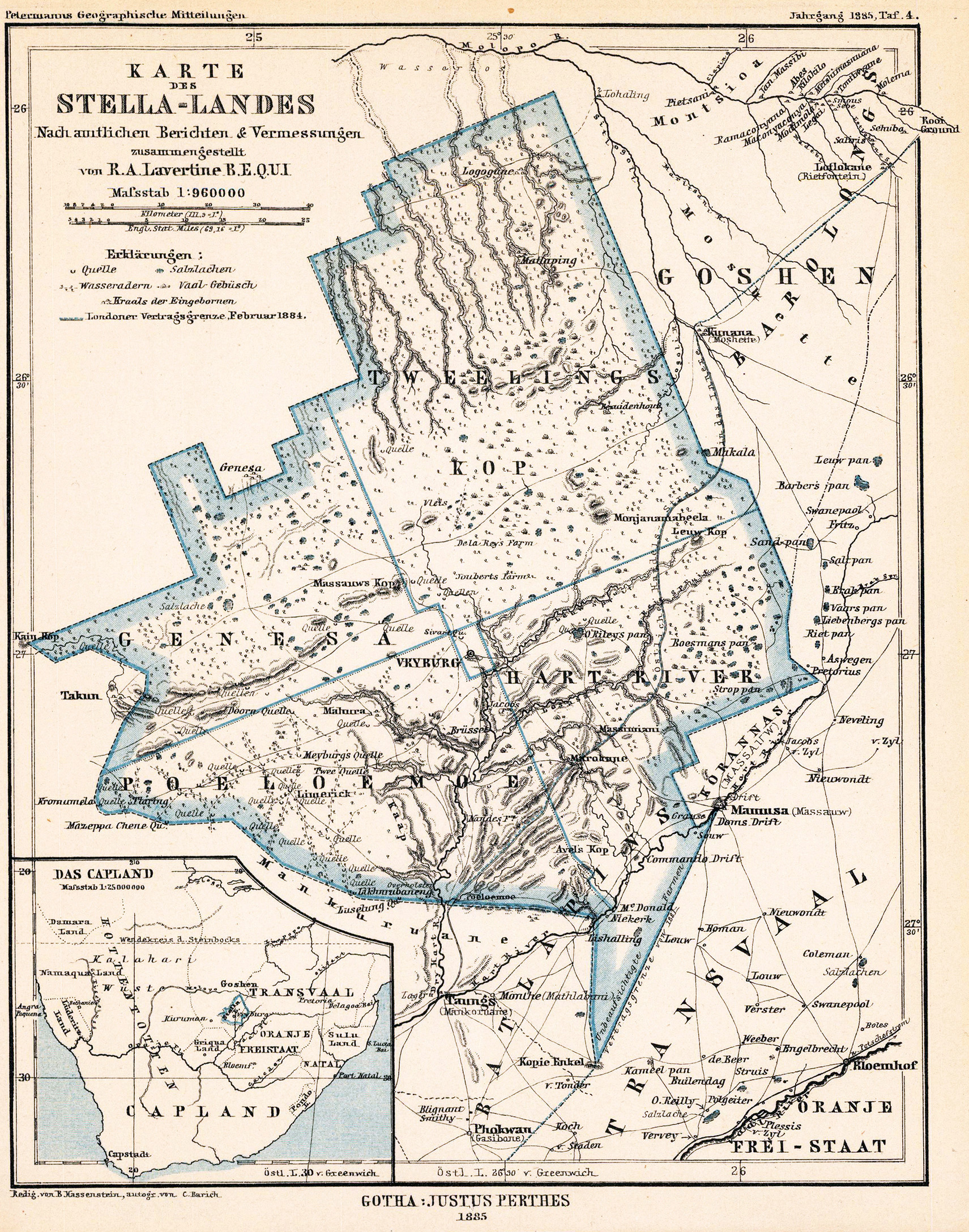 Karte des Stella-Landes, nach amtlichen Berichten & Vermessungen zusammengestellt von R. A. Lavertine B.E.Q.U.I.